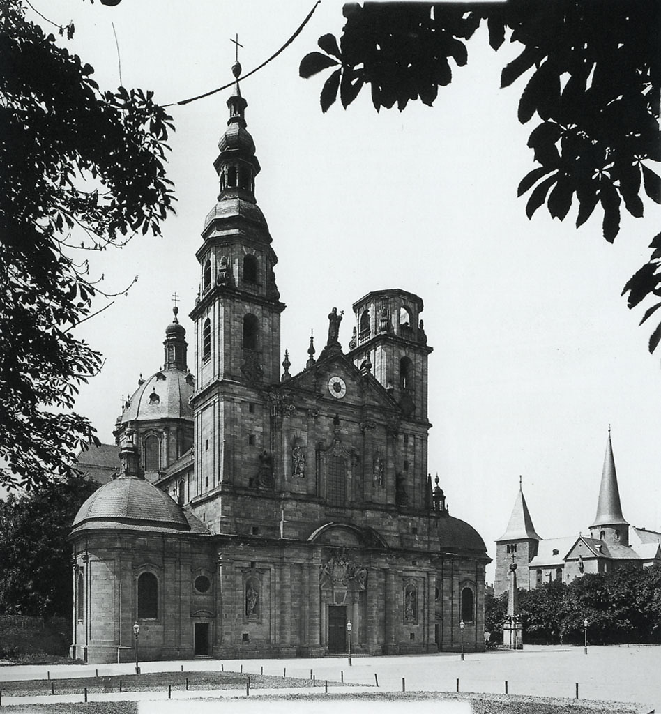 Der Fuldaer Dom mit beschädigtem Nordturm, um 1905. Durch einen Brand 1905 wurde die Haubenlaterne des nördlichen Turms zerstört. Bis 1910 wurde sie wieder aufgebaut. Die schwarze Strich am linken oberen Bildrand wird durch einen Glasbruch im Glasnegativ verursacht.